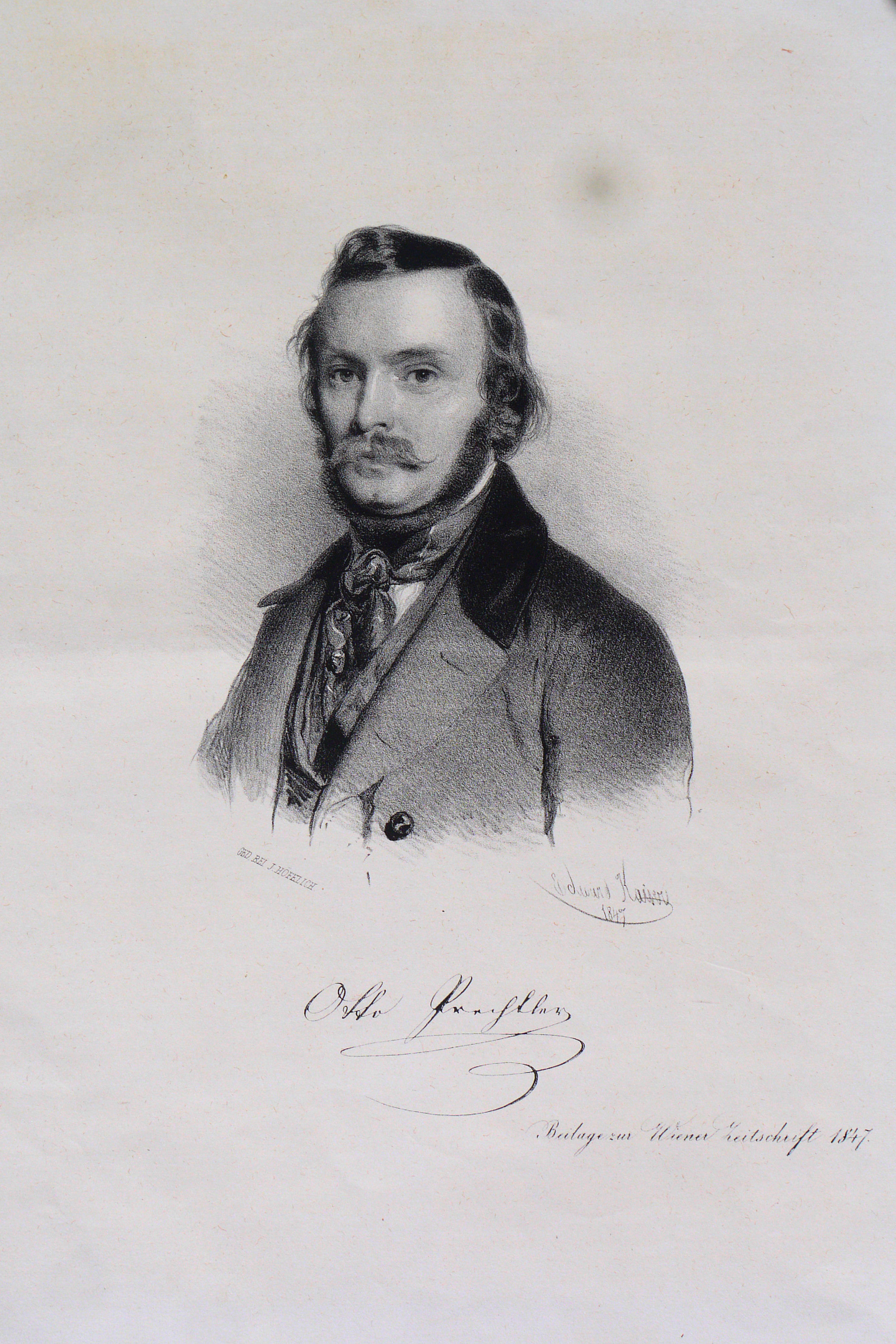 Johann Otto Prechtler (1813-1881), österreichischer Dichter, Beamter. Lithographs by Eduard Kaiser . 1847